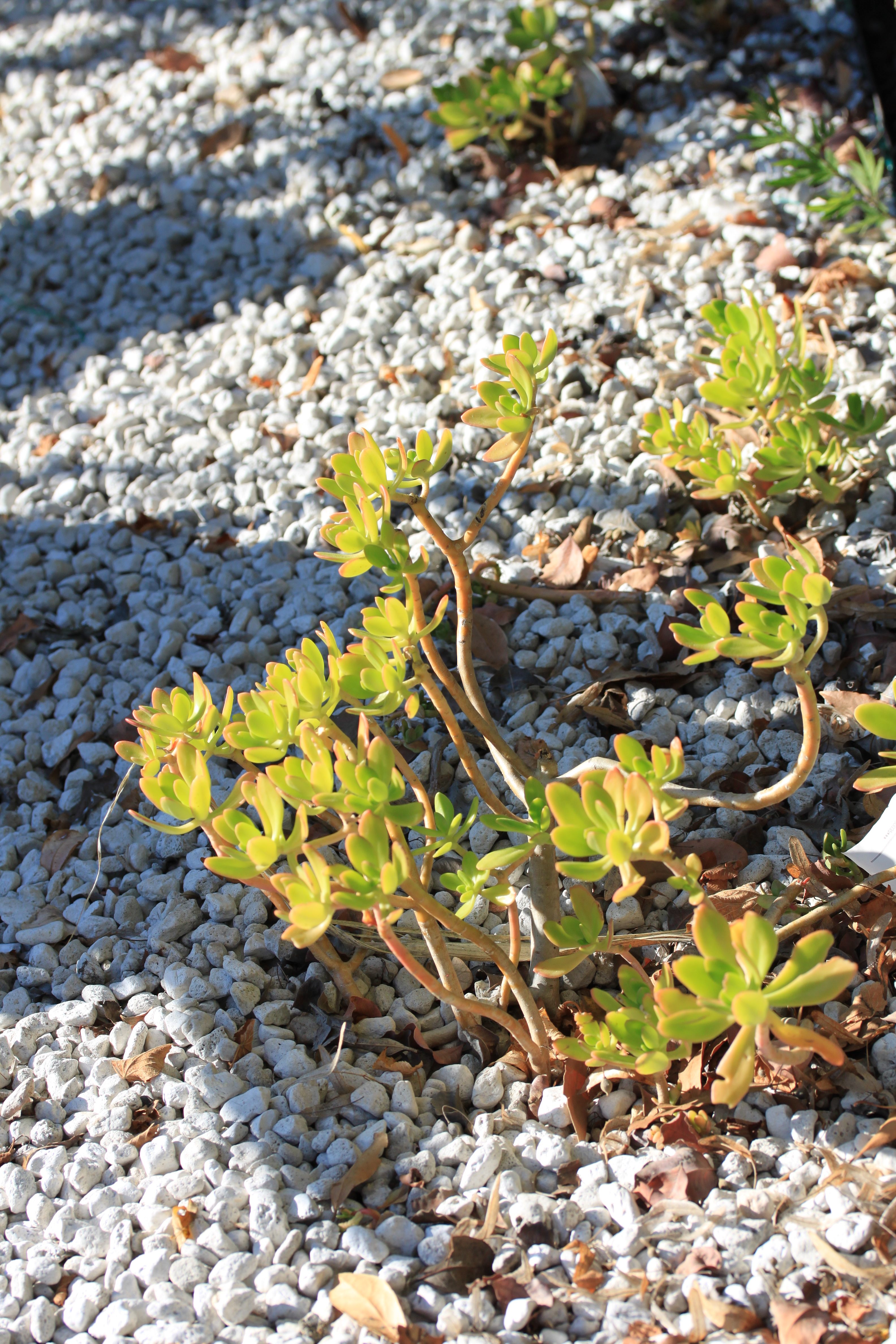 Sedum dendroideum, muséum de Toulouse